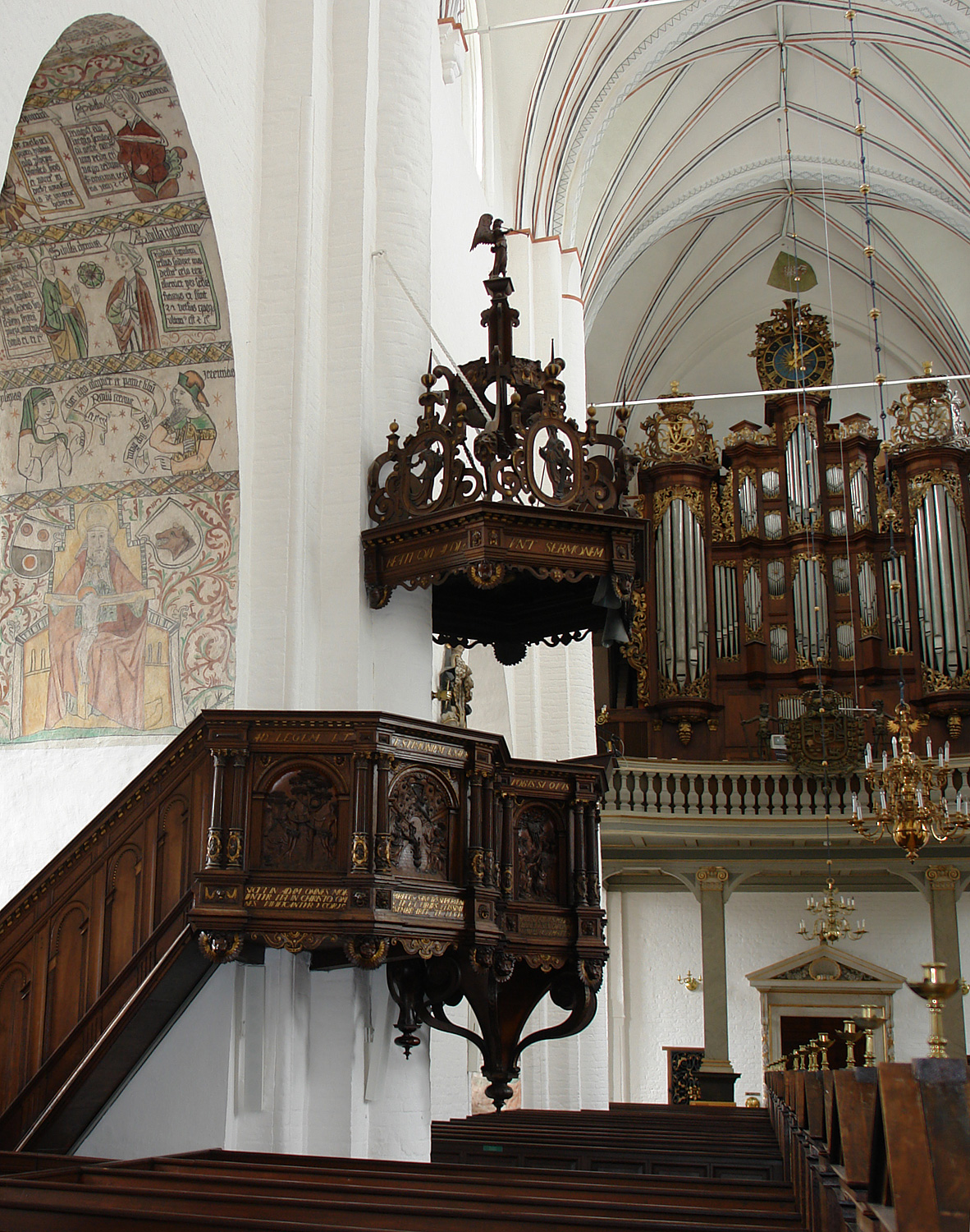 Dom zu Århus: Renaissance Kanzel aus Eiche von 1588. Erstellt von Michael van Groningen mit neun Motiven aus dem Alten- und Neuen Testament